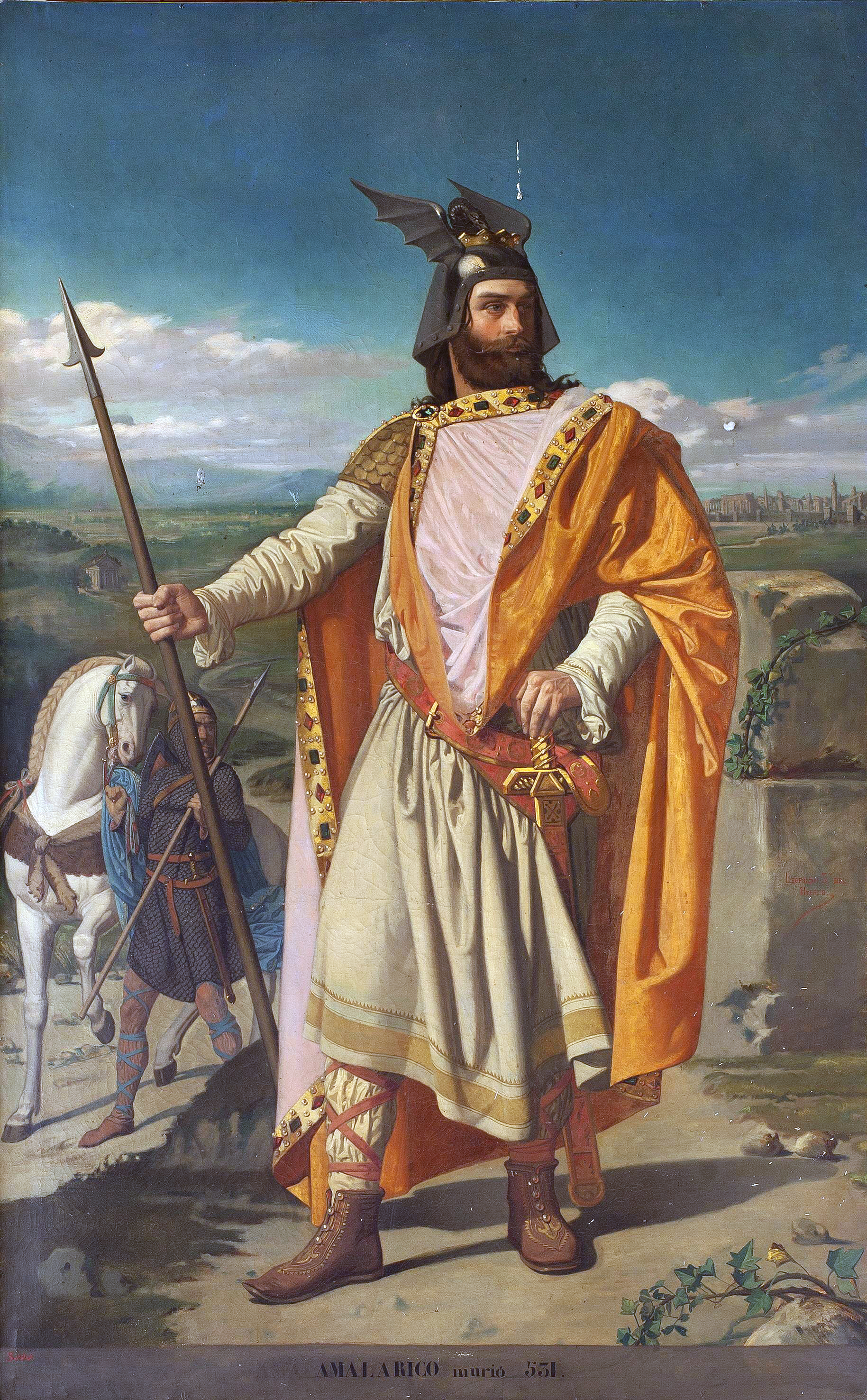 Retrato imaginario de Amalarico († 532), rey de los Visigodos e hijo del rey Alarico II y de la reina Teodegonda.